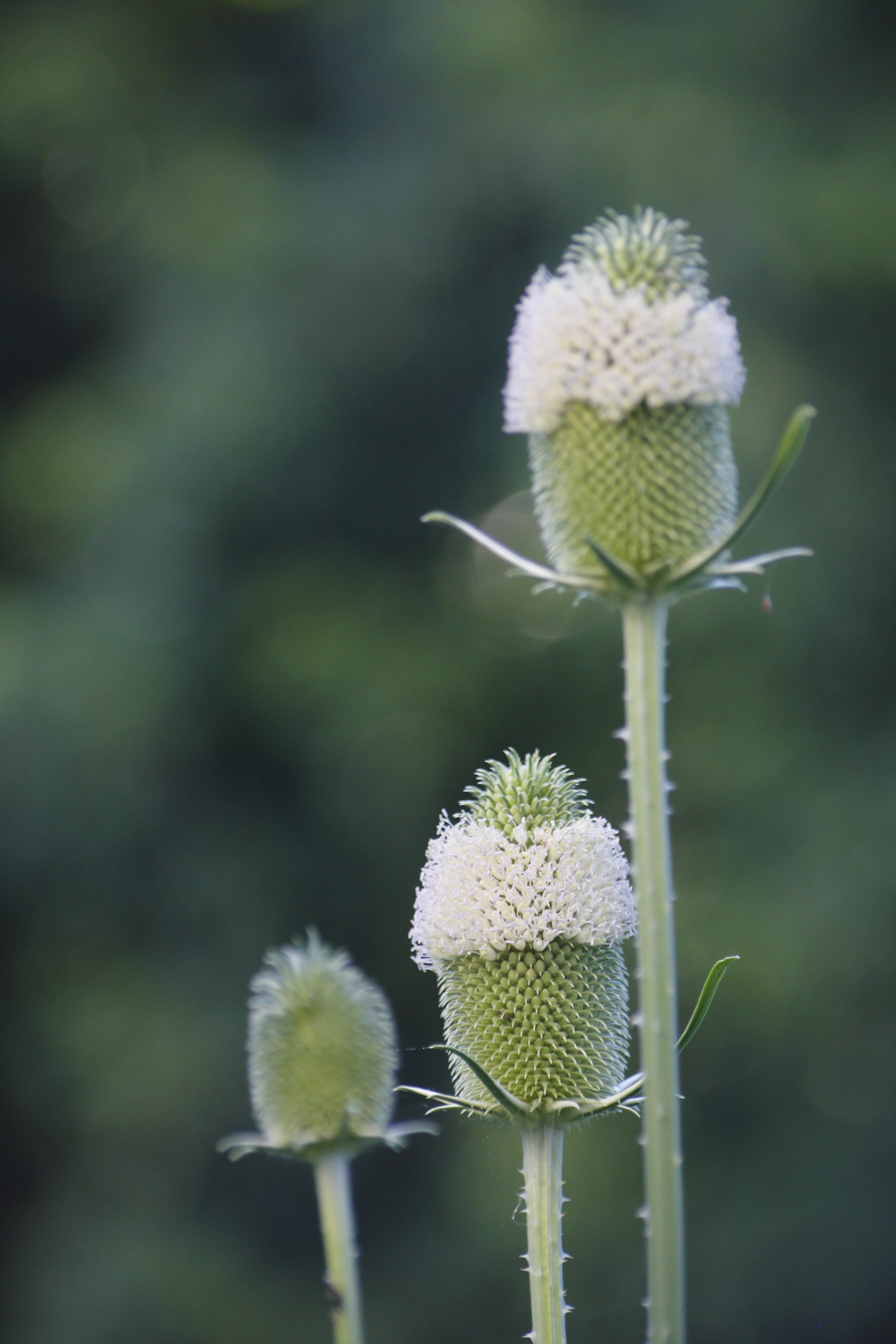 Dipsacus sativus ou cardère à lainer en fleur. Photographiée dans l’Ain en juillet 2016.